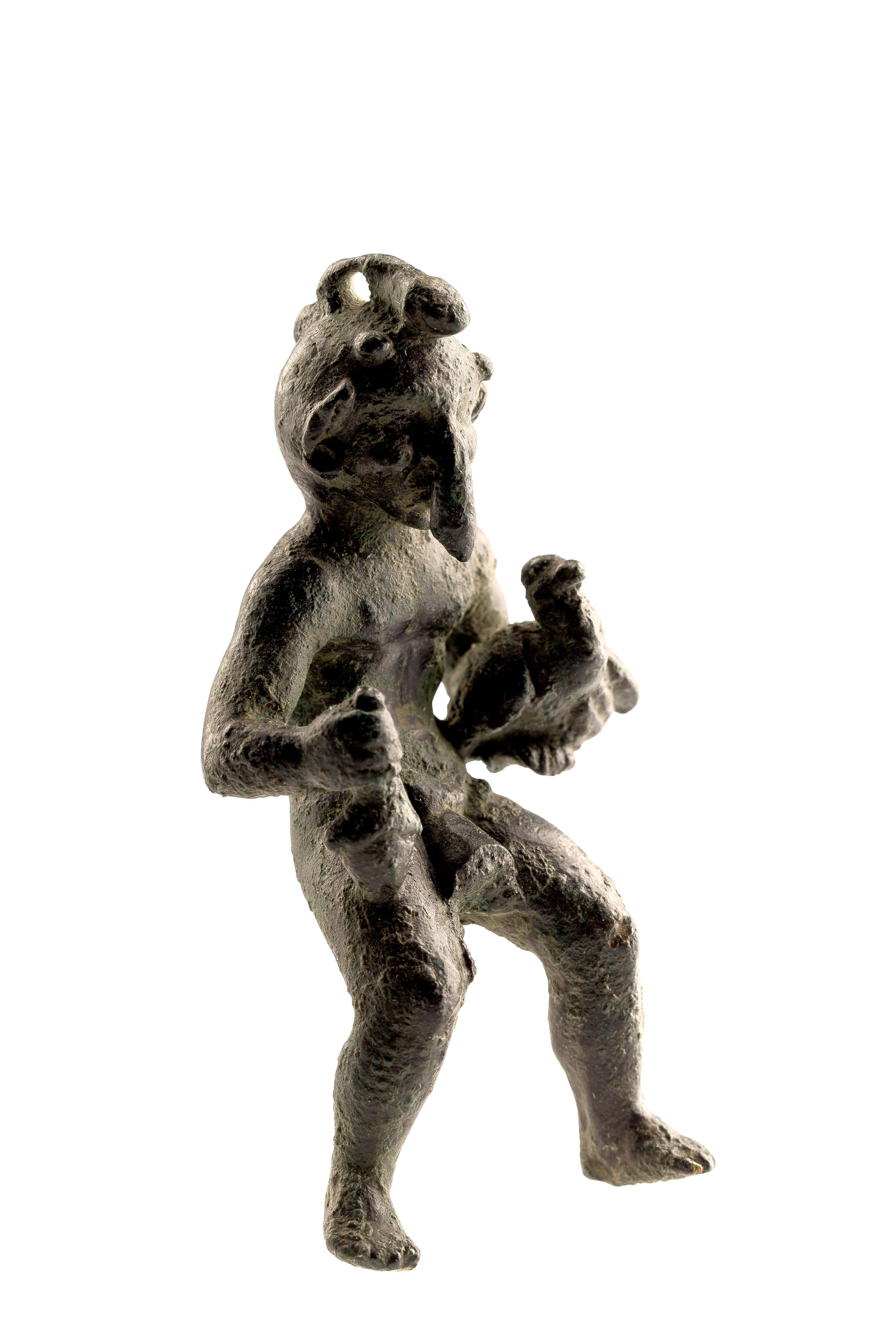 Figurine van Mercurius met drie falli in brons, 100 tot 250 NC, vindplaats: Tongeren, zuidwestgrafveld, Paspoel, 1880-1882, Romeinse Kassei/Linderstraat/Koninksemsteenweg, collectie Gallo-Romeins Museum Tongeren, GRM 2545